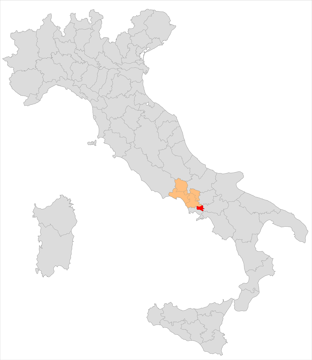 Il circondario di Nola nella provincia di Terra di Lavoro (1860-1927)